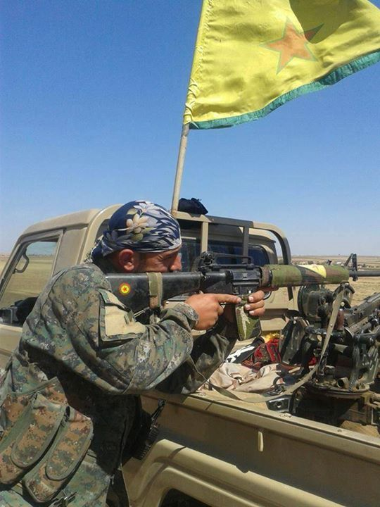 Kurdish Fighter YPG